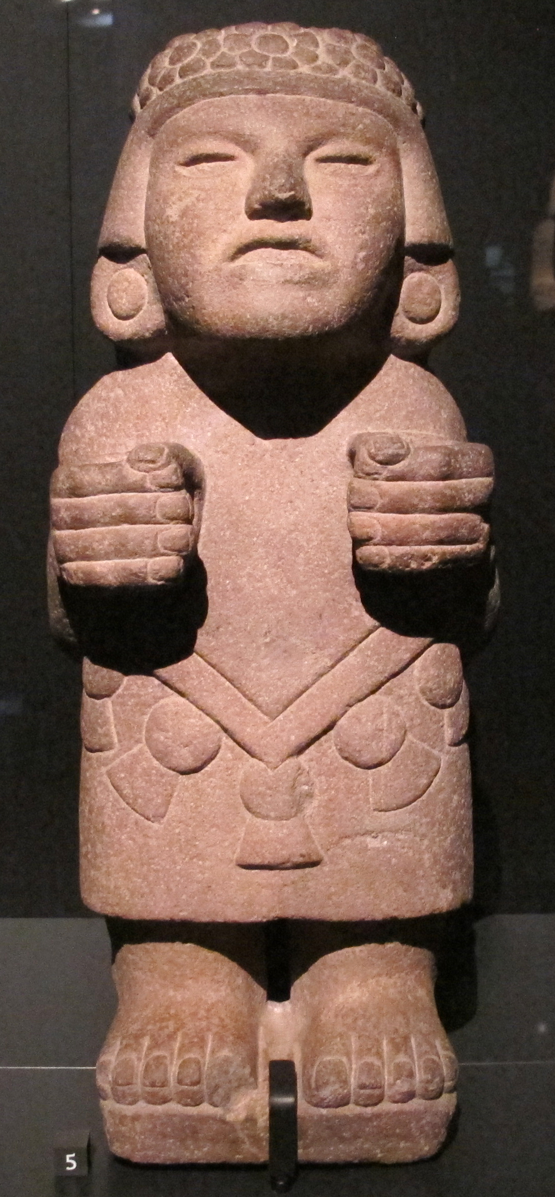 Musée du quai Branly